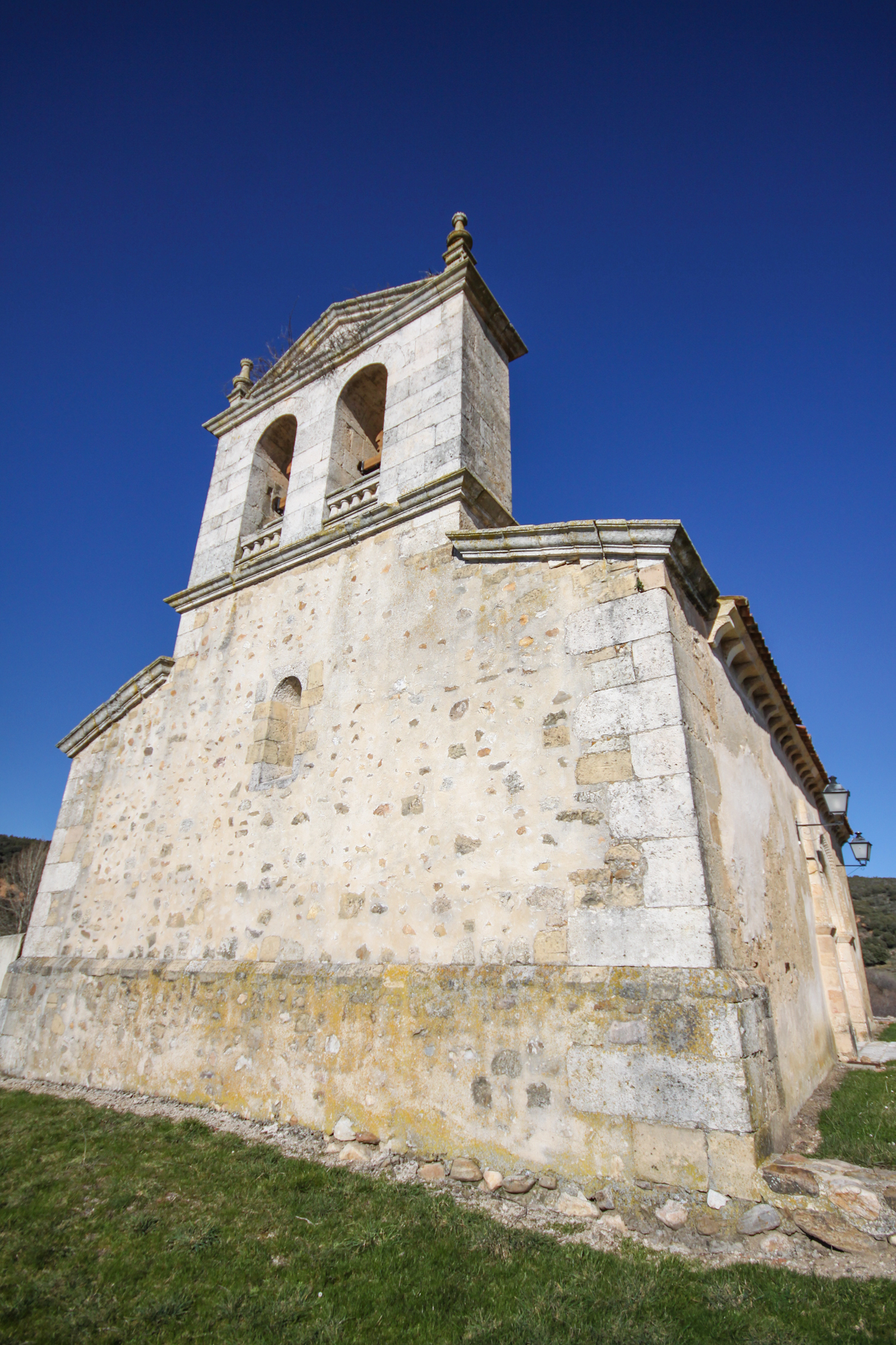 g